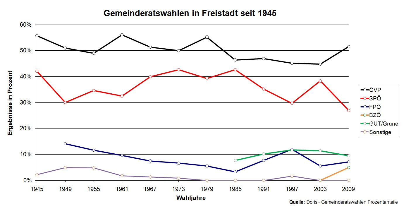 Gemeinderatswahlergebnisse in Freistadt seit 1945